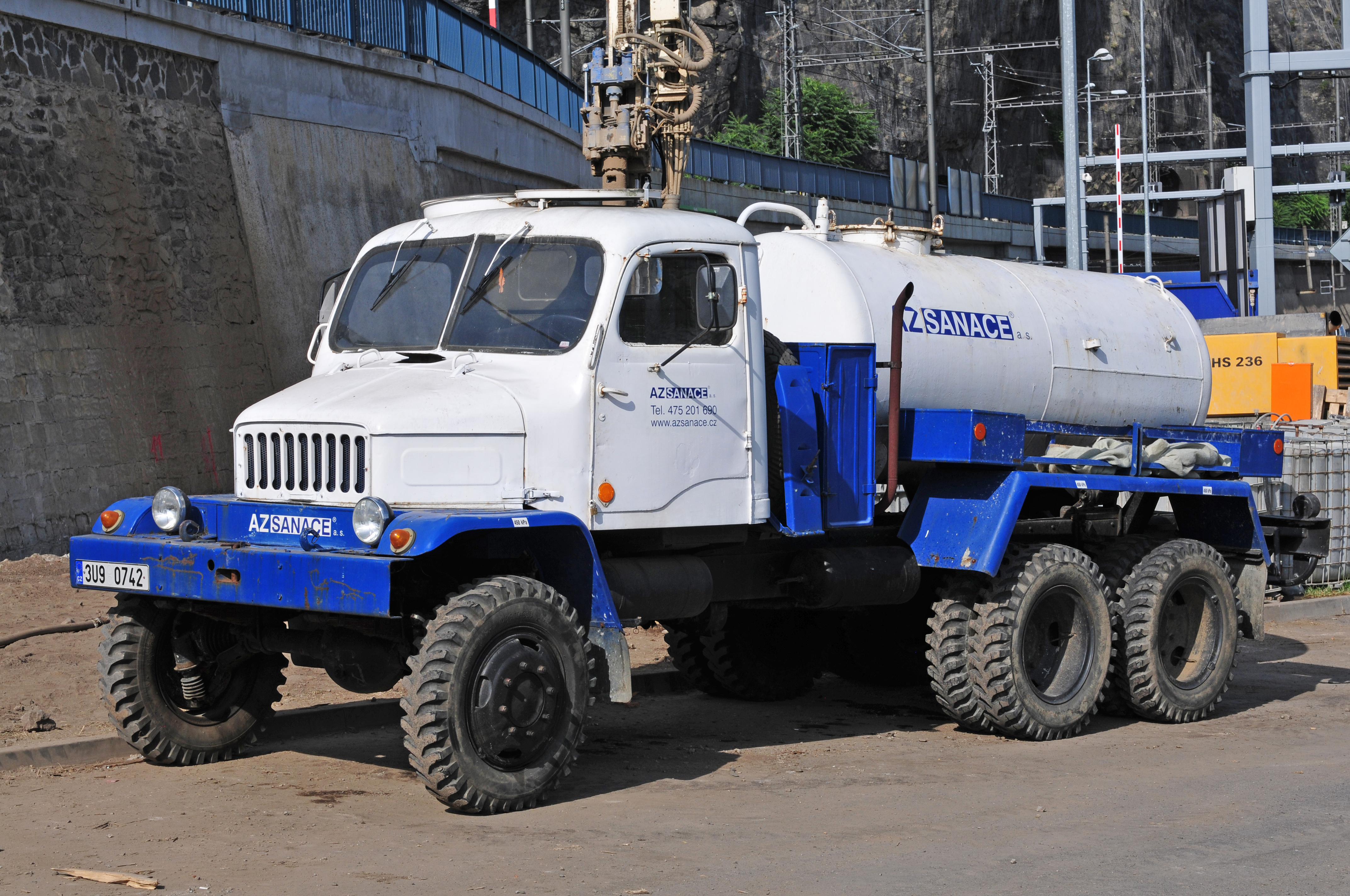 Ústí nad Labem